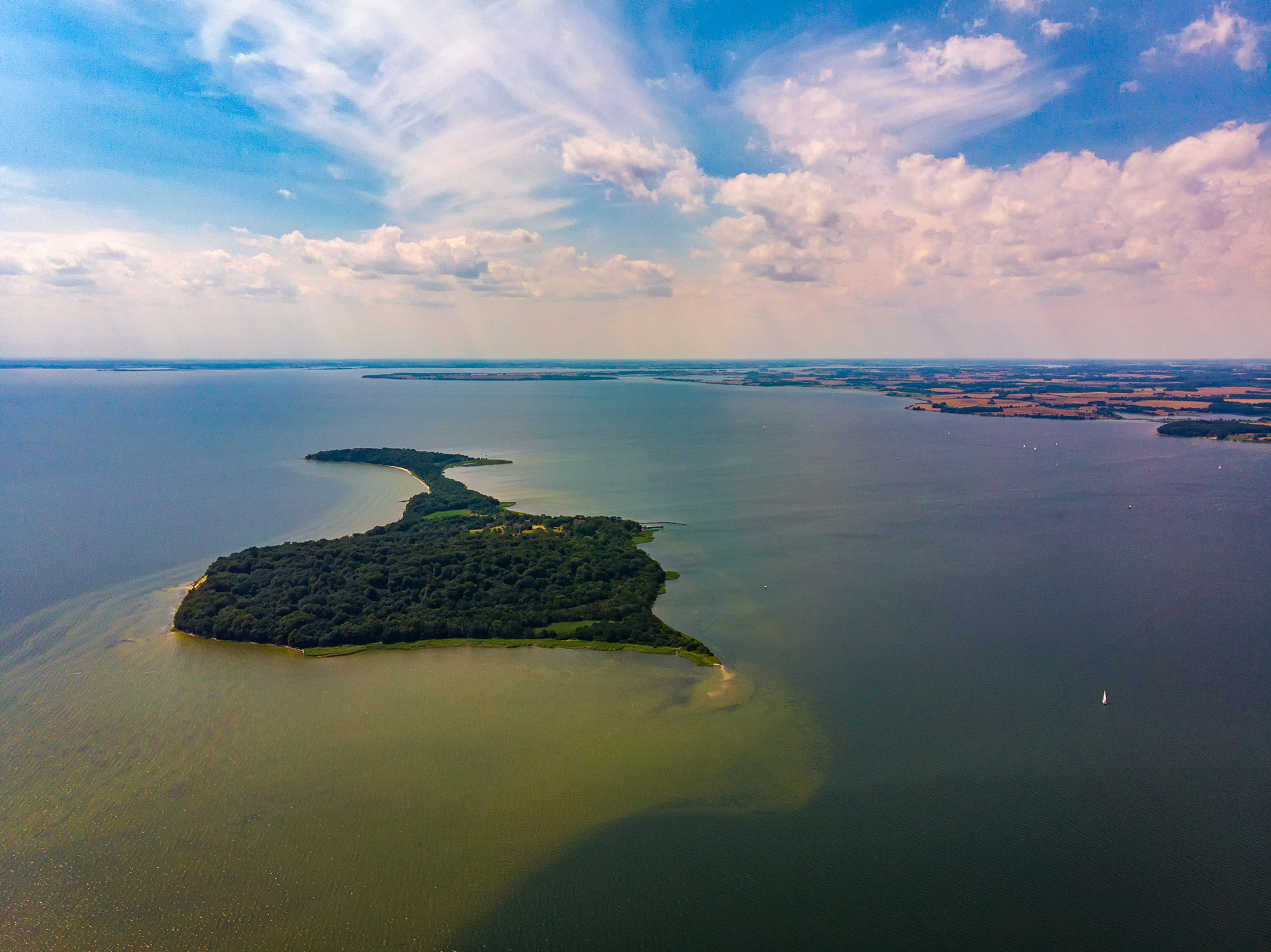 Insel Vilm in der Ostsee südlich von Rügen, Startplatz Muglitzer Ort, Blick aus NNO 1,1 km entfernt, Höhe 386 m, im Hintergrund Rügen, Schoritzer Wiek in Bildmitte